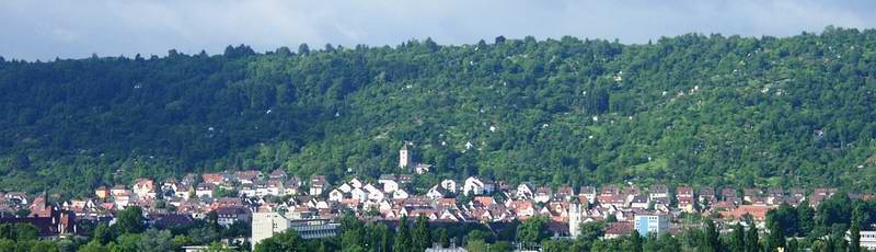 GNU-FDL Stuttgart-Wangen von Benutzer:Enslin fotografiert am 12.6.2004 Kategorie:Stuttgart